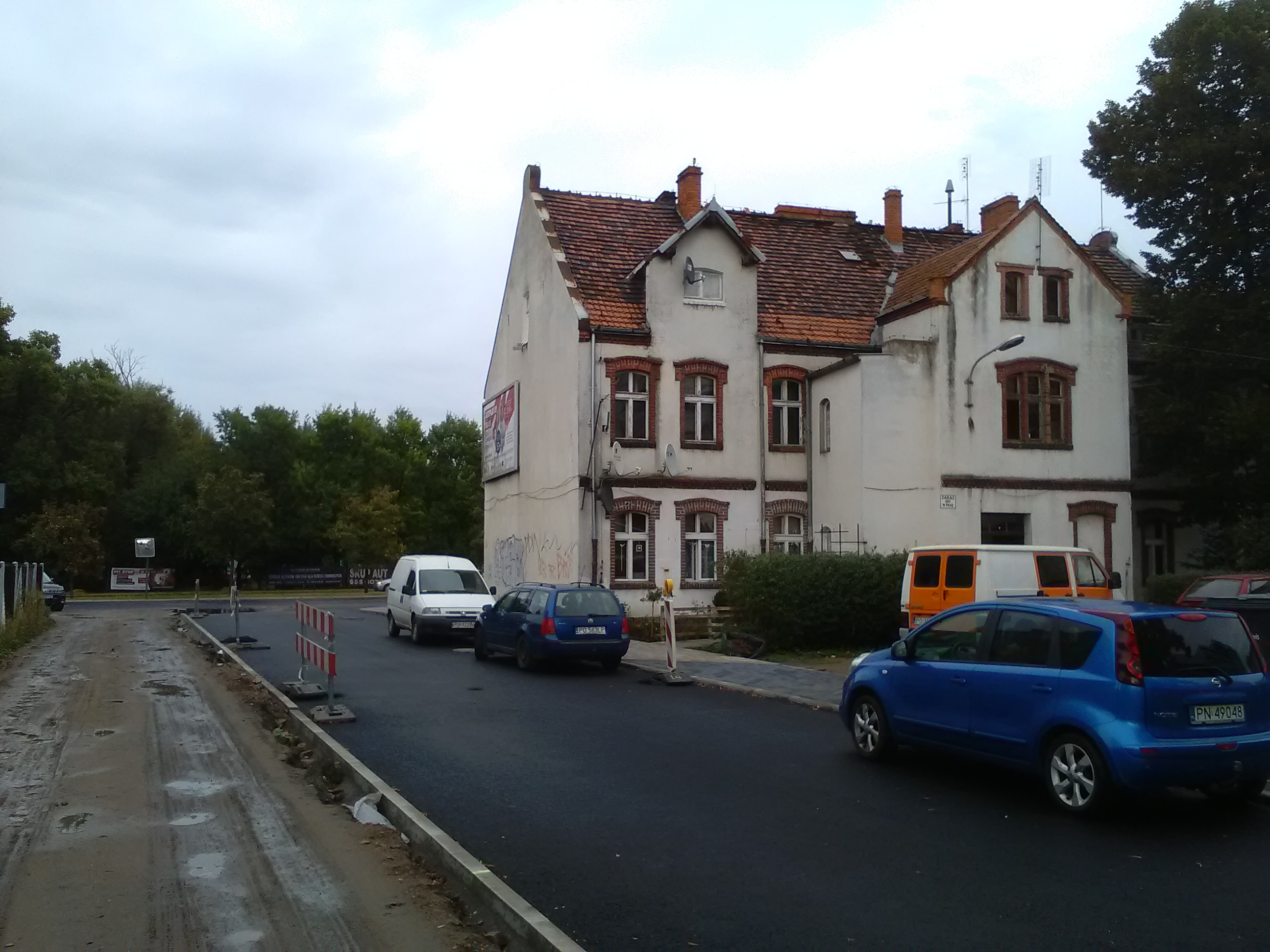 Ulica Morzyczańska w Poznaniu.